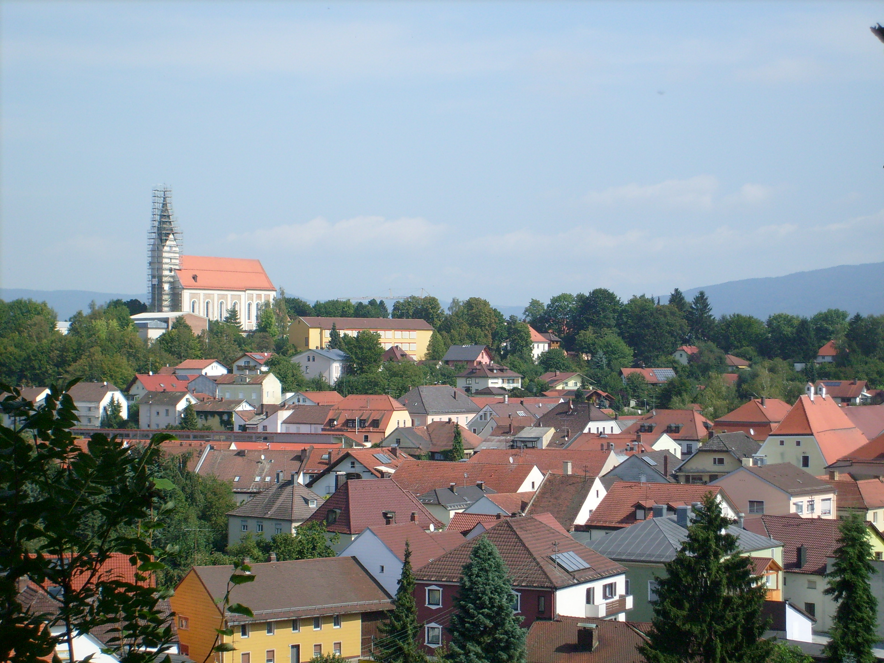 Blick auf Hengersberg. Fotografiert von der Frauenbergkirche aus.